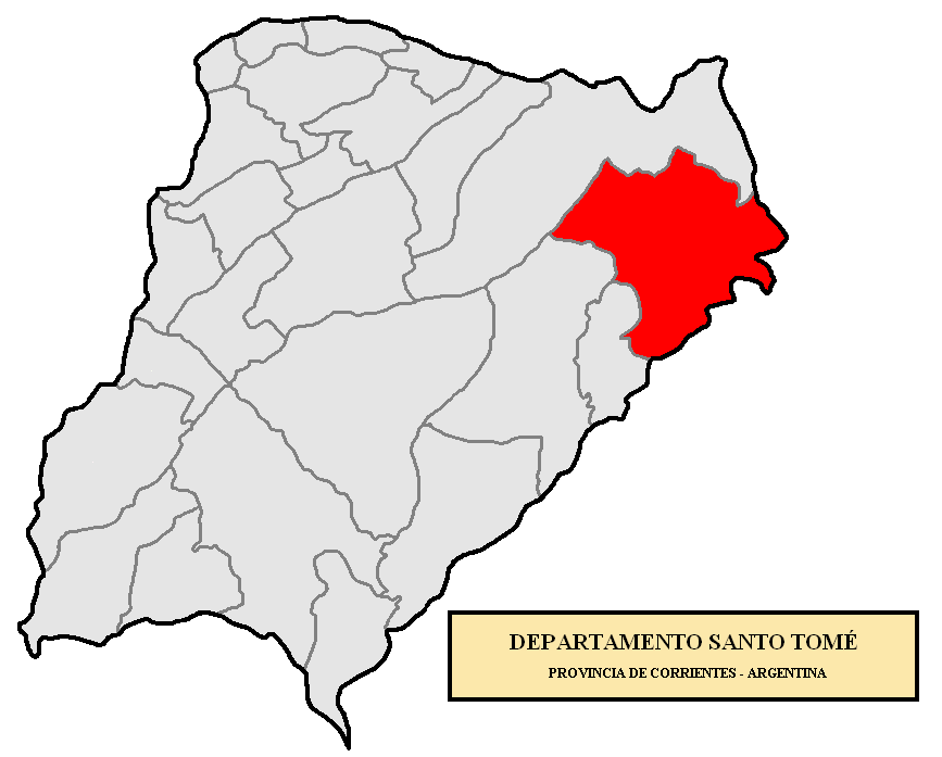 Ubicación de Santo Tomé. Localización del Departamento Santo Tomé, en la provincia de Corrientes, Argentina.